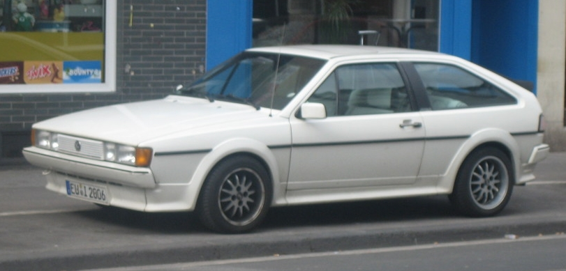 Ein seltender Scirocco II WhiteCat